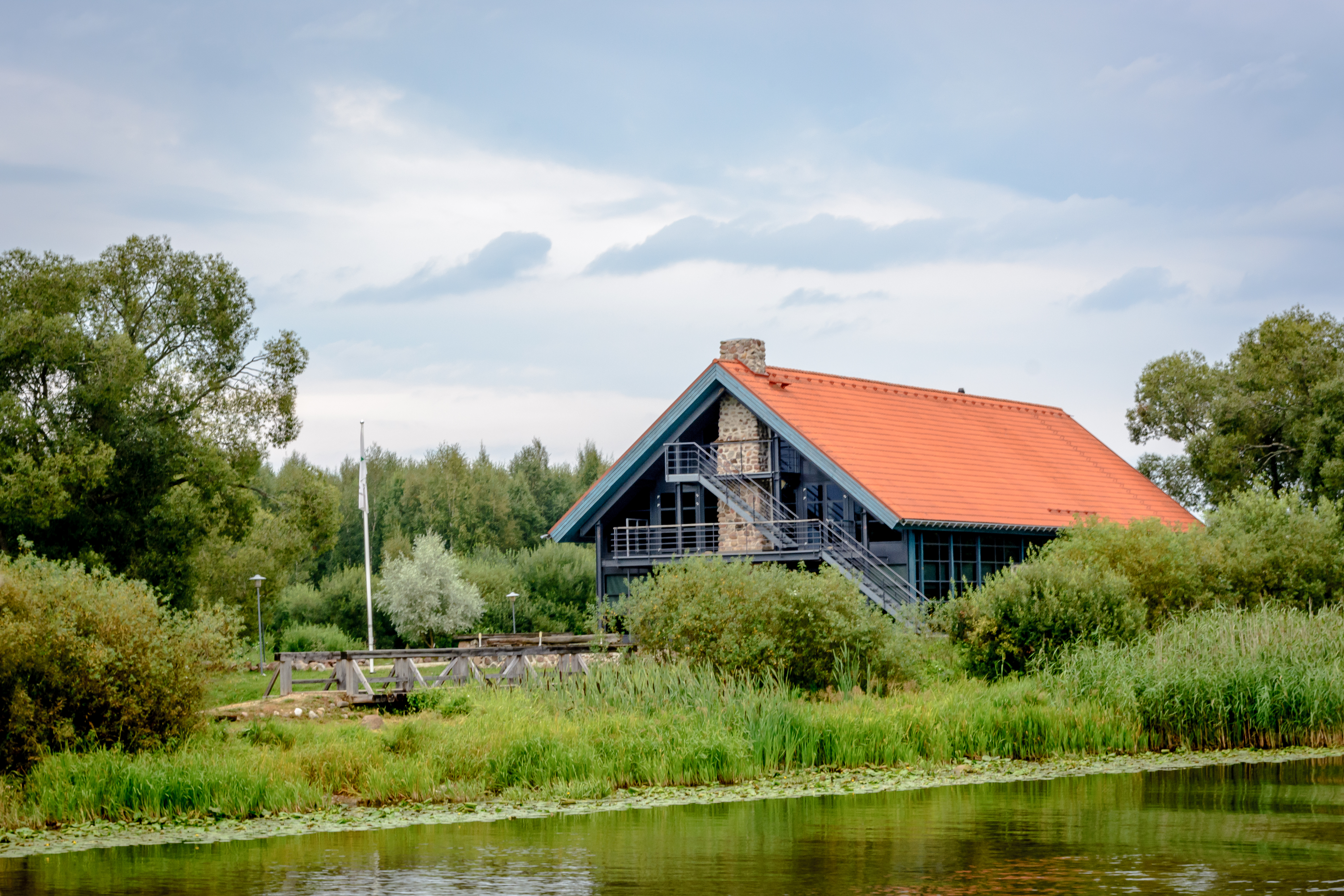 Uue-Kastre linnuse territoorium vallikraavidega